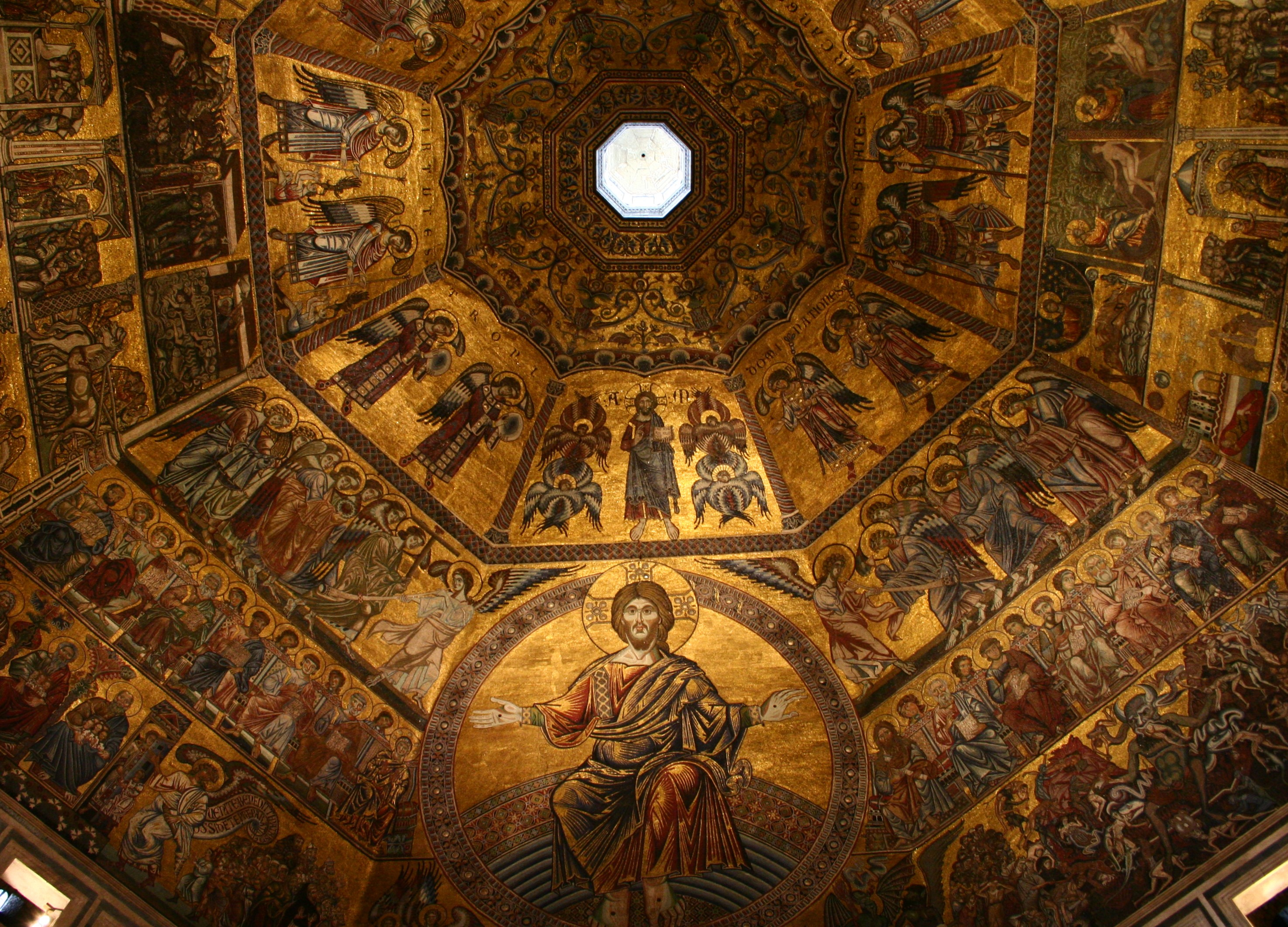 Baptistère Saint-Jean (Florence)